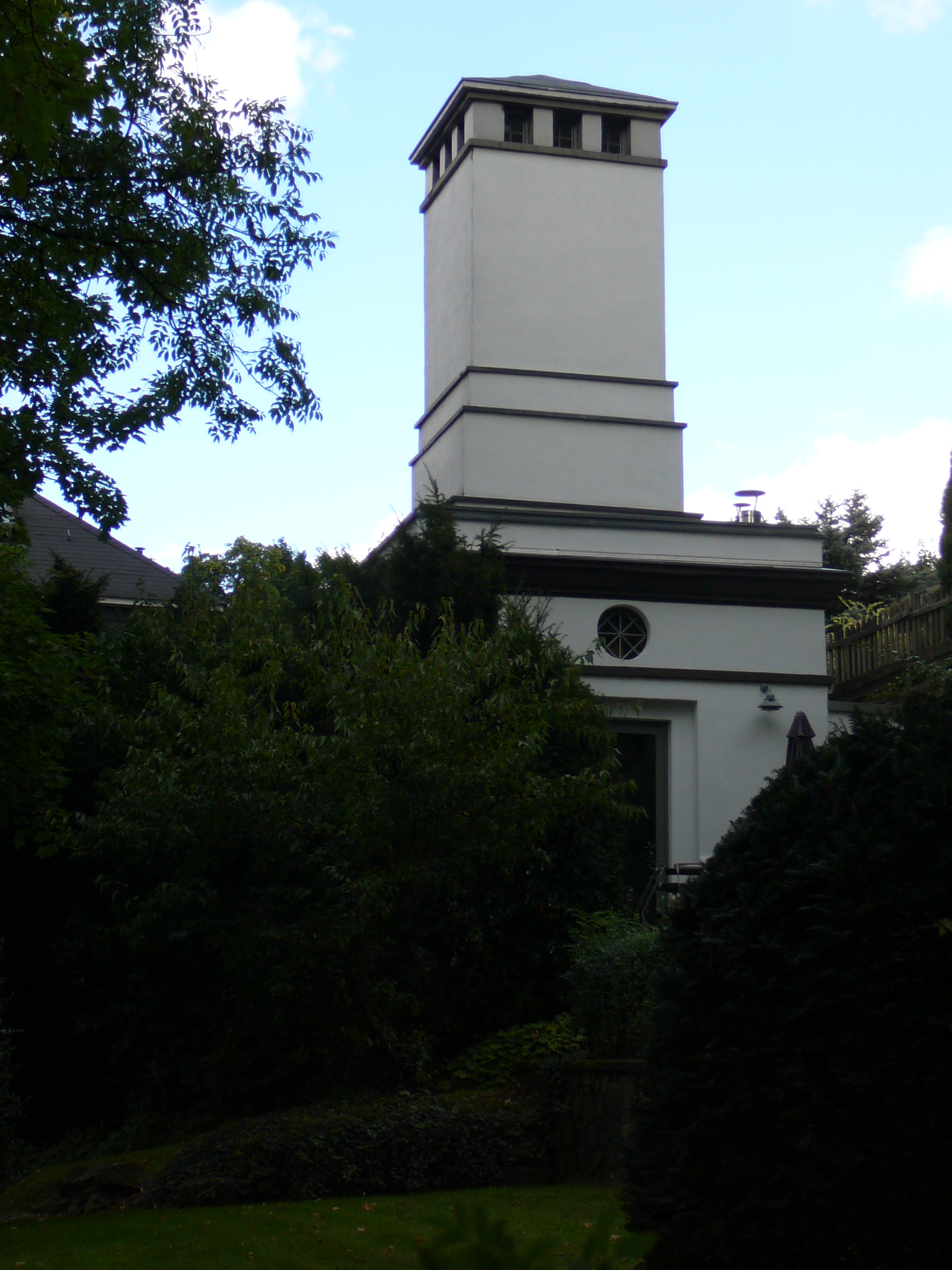 Garnisonstraße 26, ehem. Transformatorenturm, Denkmalbereich "Historischer Ortskern Solingen-Gräfrath"This is a photograph of an architectural monument.